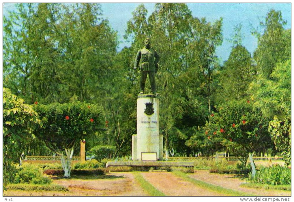 Postcard: Foto Iris No 09 - Estátua de Teixeira Pinto - Bissau